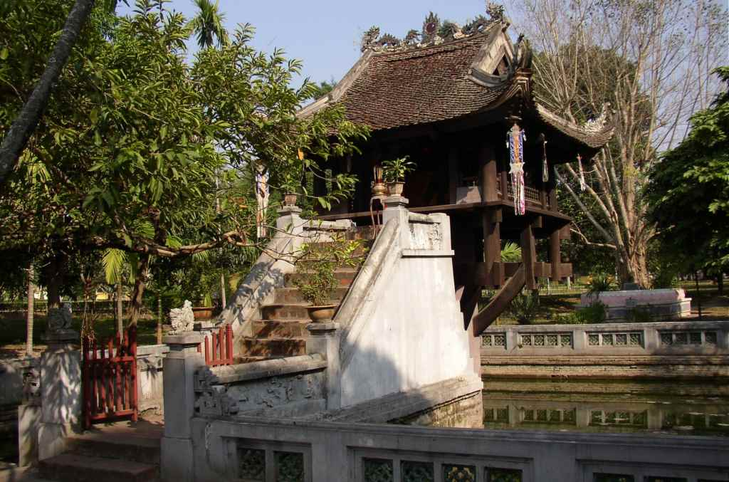 Beschreibung: Ein-Säulen-Pagode in Hanoi (Vietnam) Quelle: selbst fotografiert Fotograf/Zeichner: Andre Lettau Datum der Aufnahme: 14.12.2003 16:57, 28. Jun 2005 Andre Lettau 1024 x 677 (92903 Byte) (* Beschreibung: Ein Säulen Pagode in Hanoi (Vietnam) * Quelle: selbst fotografiert * Fotograf/Zeichner: Andre Lettau * Datum der Aufnahme: 14.12.2003 * Lizenzstatus: GFDL )